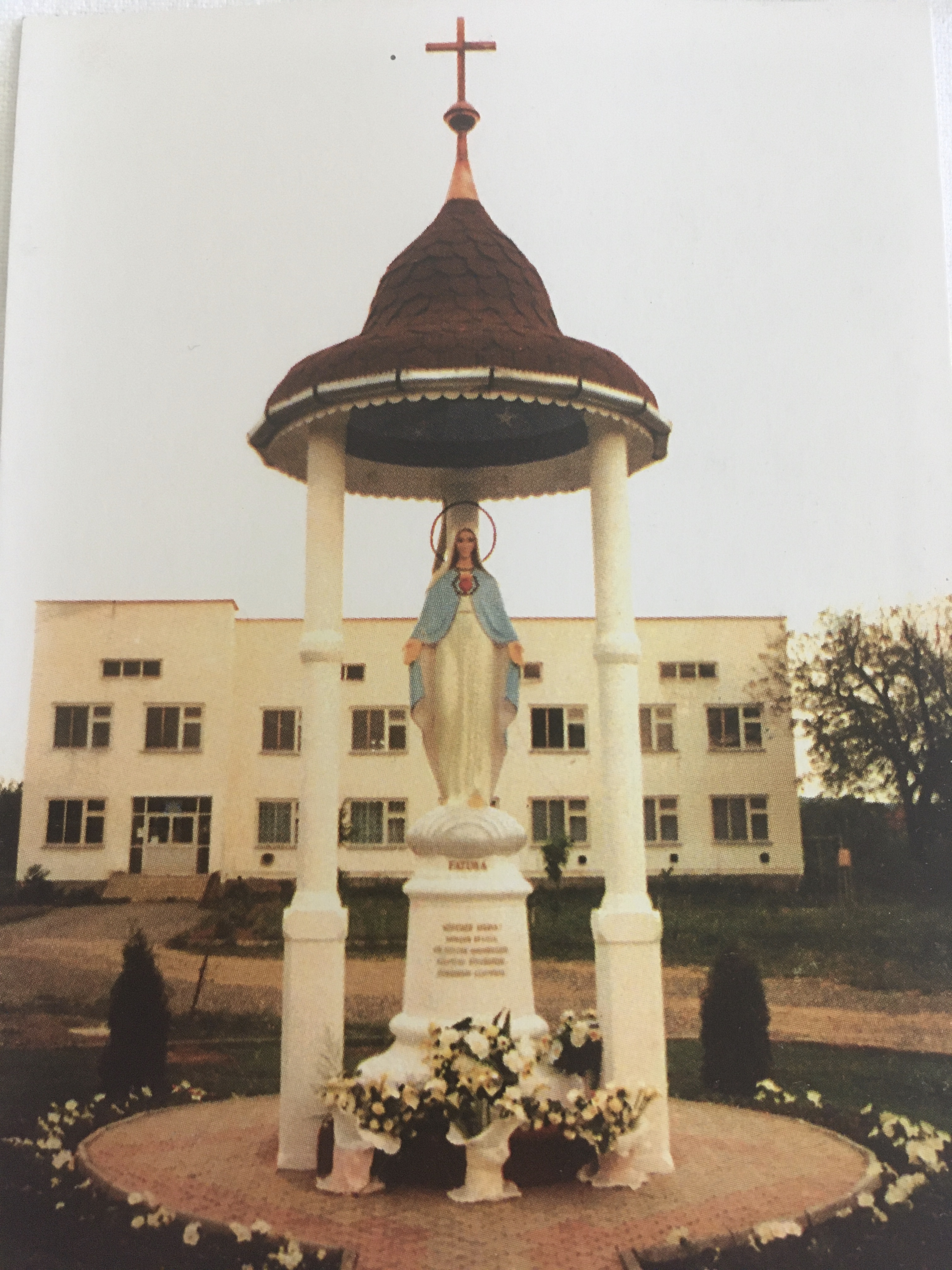 Fatimai Szűzanya-szobor Nevetlenfaluban